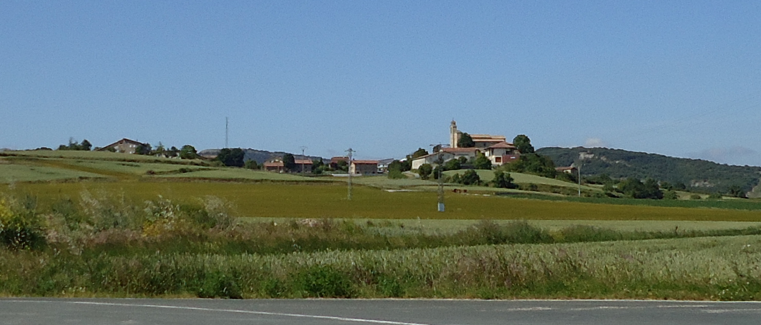 Uribarri Dibiña herria (Gasteiz)